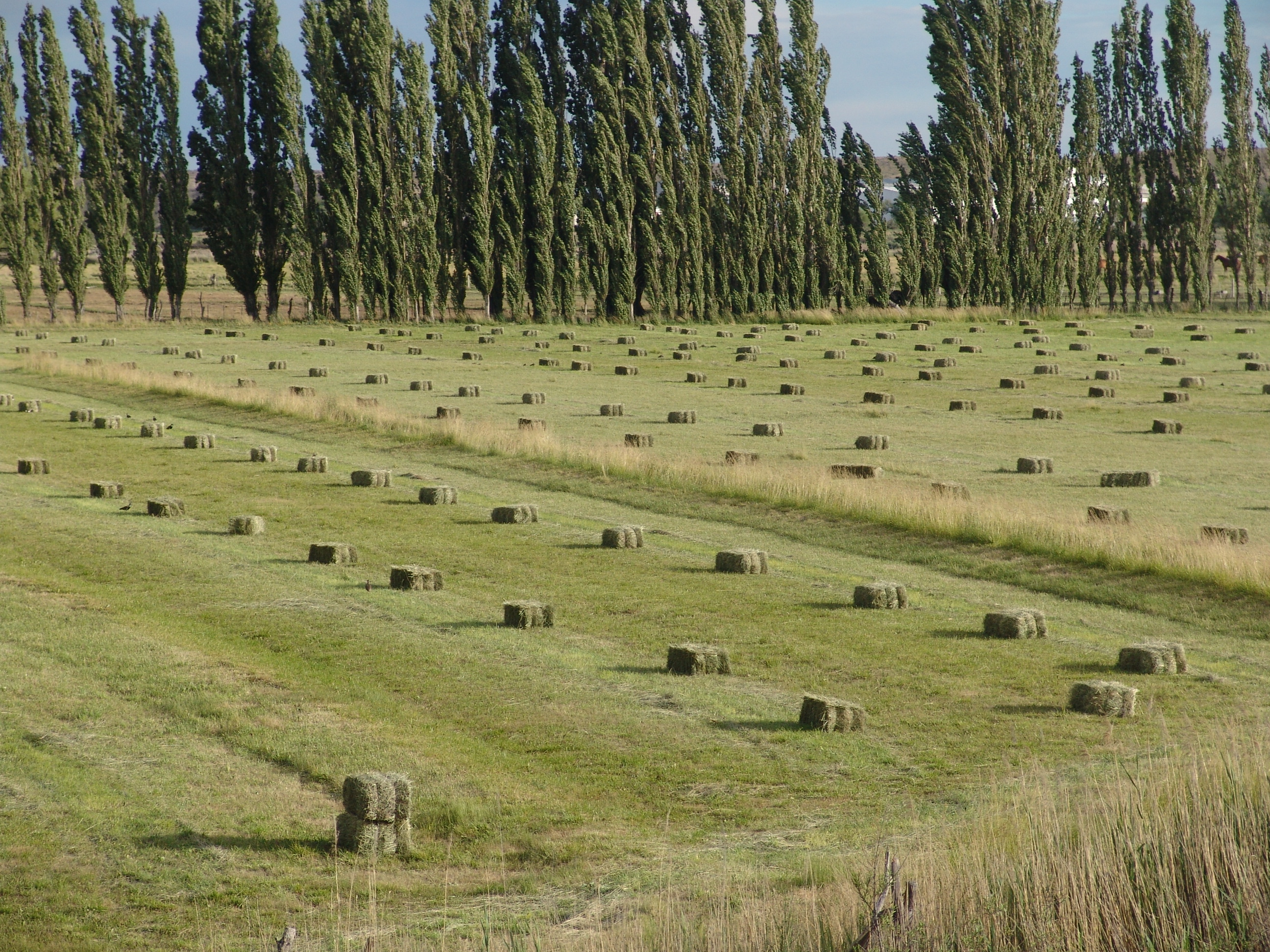 Valle Inferior del Rio Chubut, Argentina